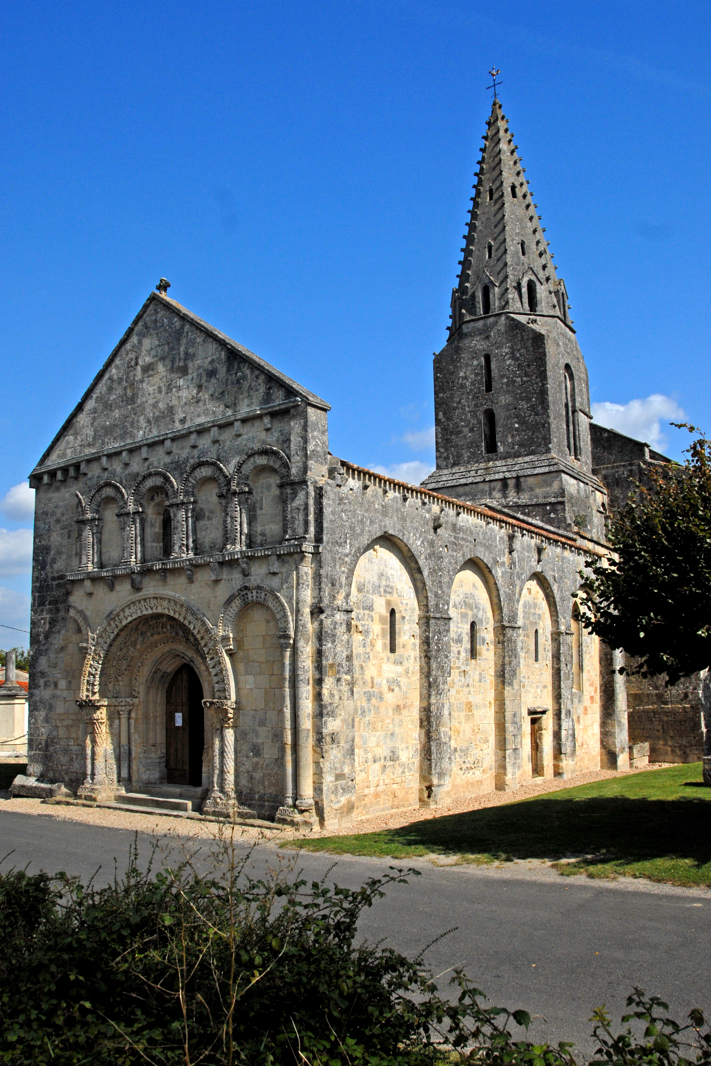 Avy, Dorfkirche,von südwest